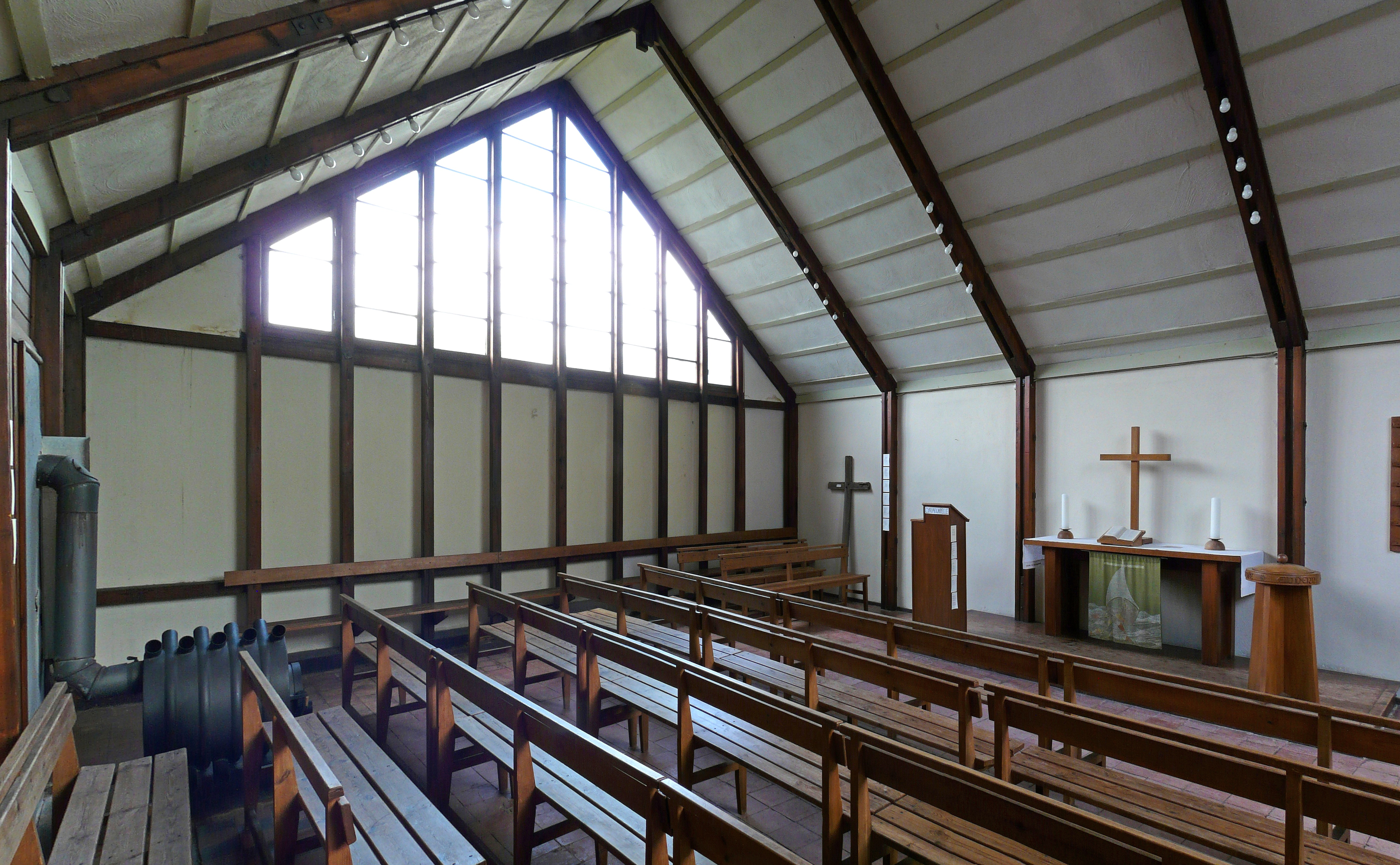 Die Cyriakkapelle in Erfurt, eine Diasporakapelle des Architekten Otto Bartning. Innenansicht des Kapellenraums aus der nordwestlichen Ecke.